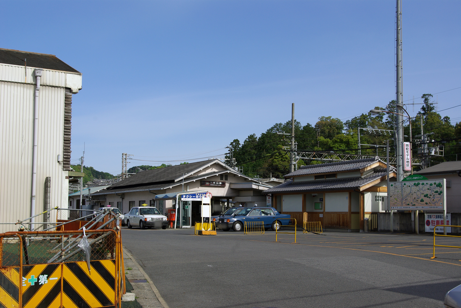 近鉄吉野線下市口駅